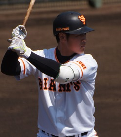 Giants_okamoto